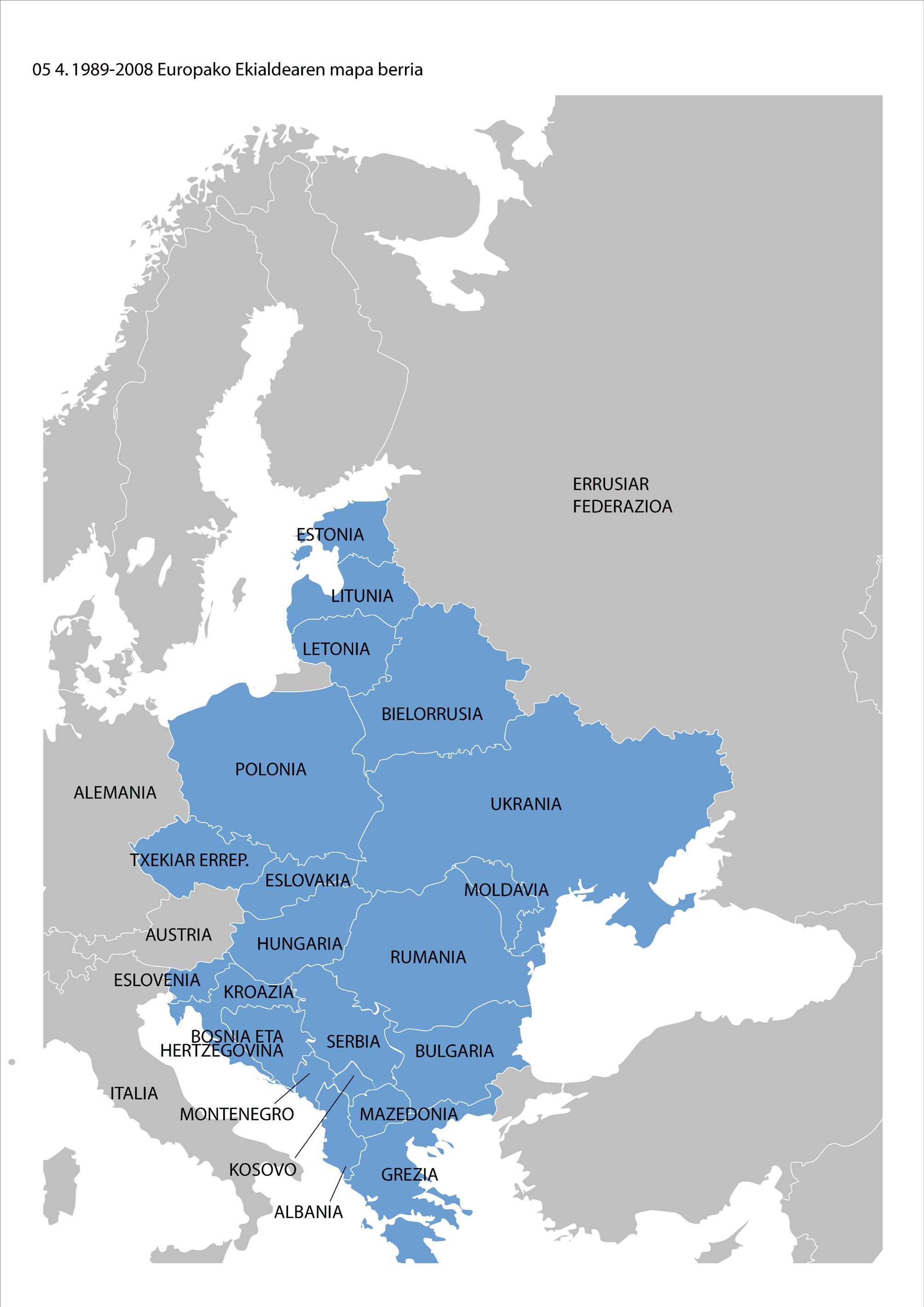 1989-2008 Ekialdeko Europaren mapa berria, UEUren liburutik hartua.